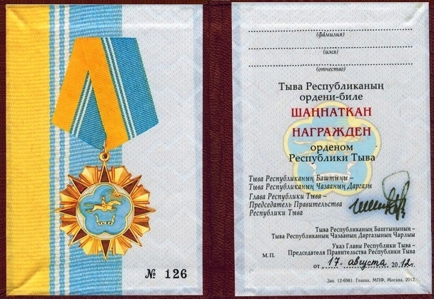 Орден Республики Тыва (удостоверение)